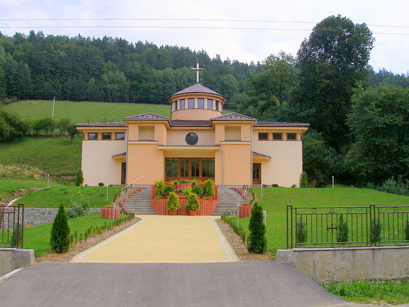 Šarišská obec Krížovany